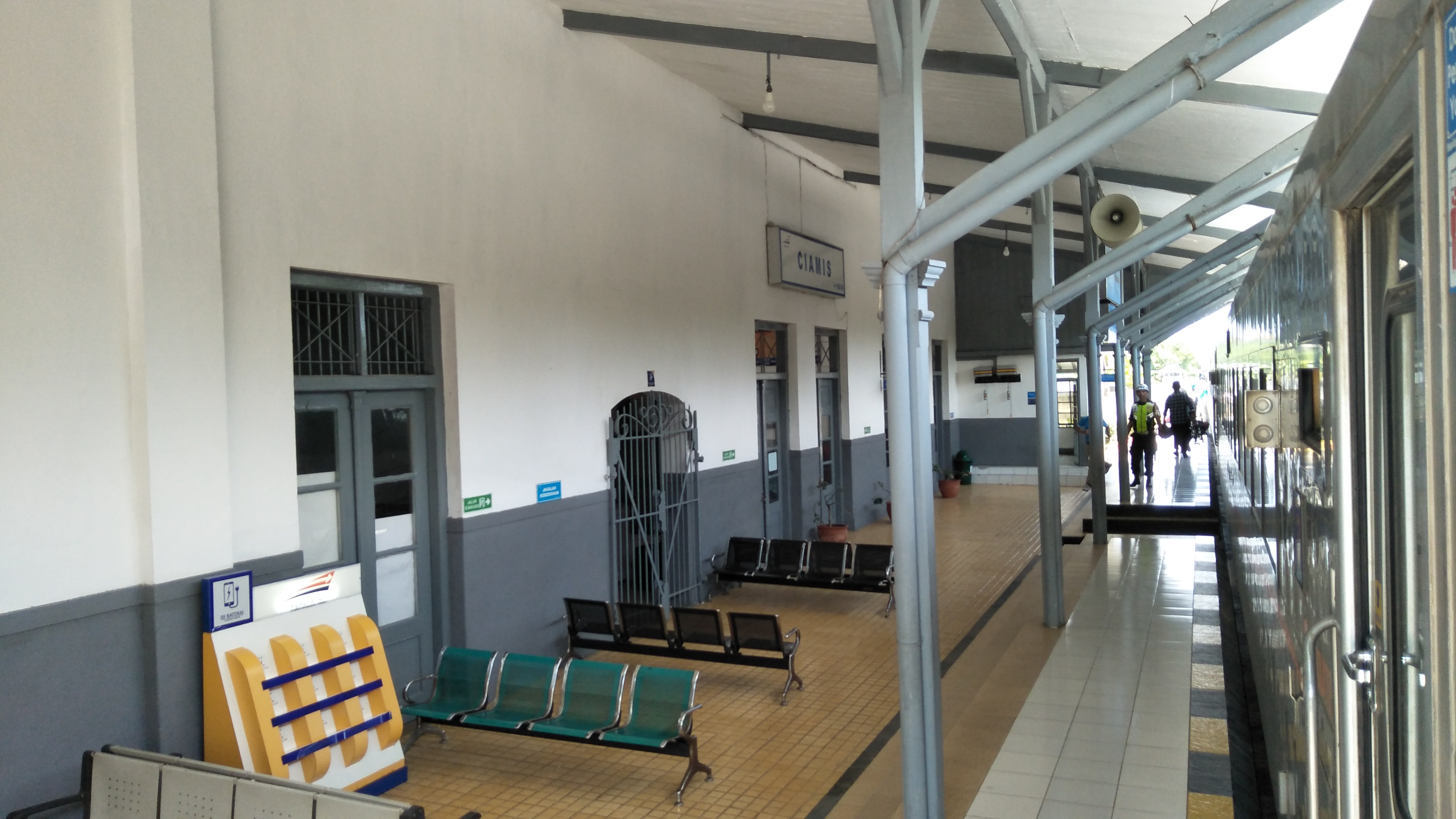 Bagian dalam stasiun Ciamis